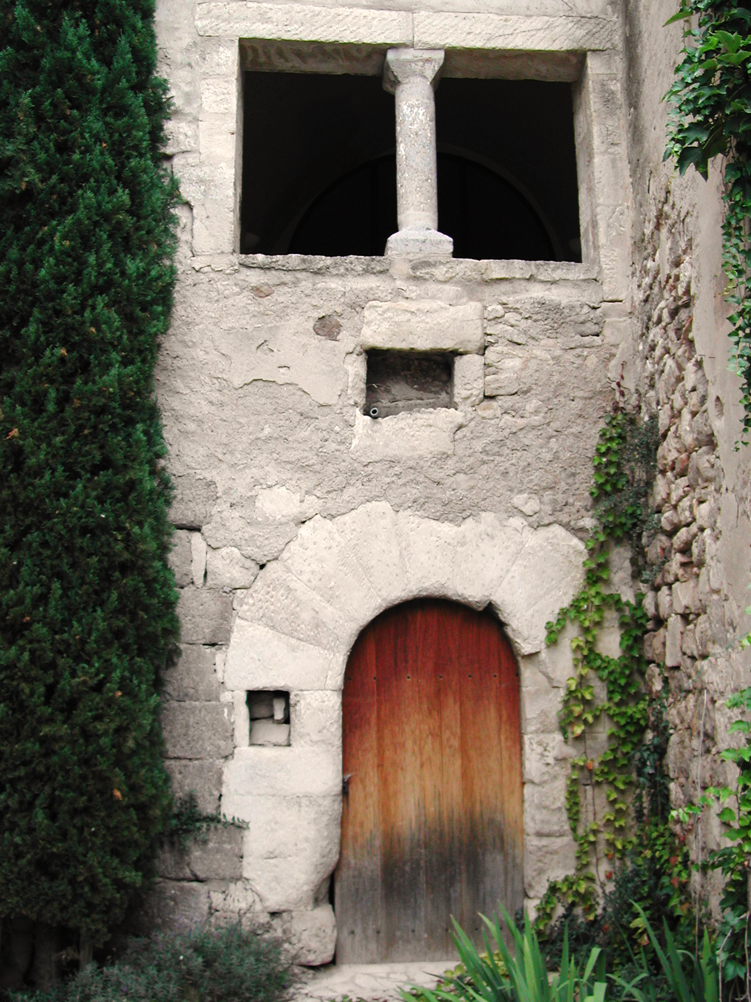 Ancienne façade de la synagogue